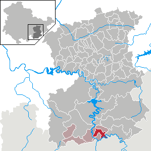 Pottiga in Thuringia - Saale-Orla-Kreis